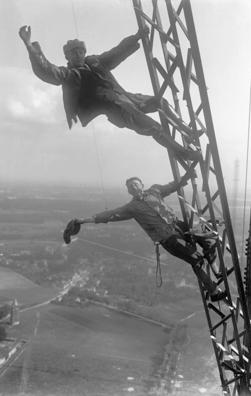 Gefährlicher Beruf! In 250 m Höhe untersuchen Ingenieure die Construktionen des Funkturmes. Tief unten die Stadt Königswusterhausen.